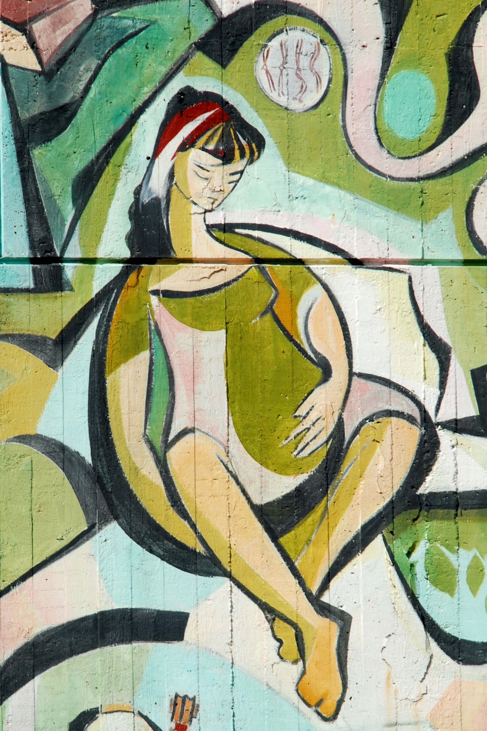 Belgique - Louvain-la-Neuve - Place Agora - Auditoires Agora - Fresque C'est la Vie (Claude Rahir, 1977 et 1995) This photo of immovable heritage has been taken in the Walloon Region